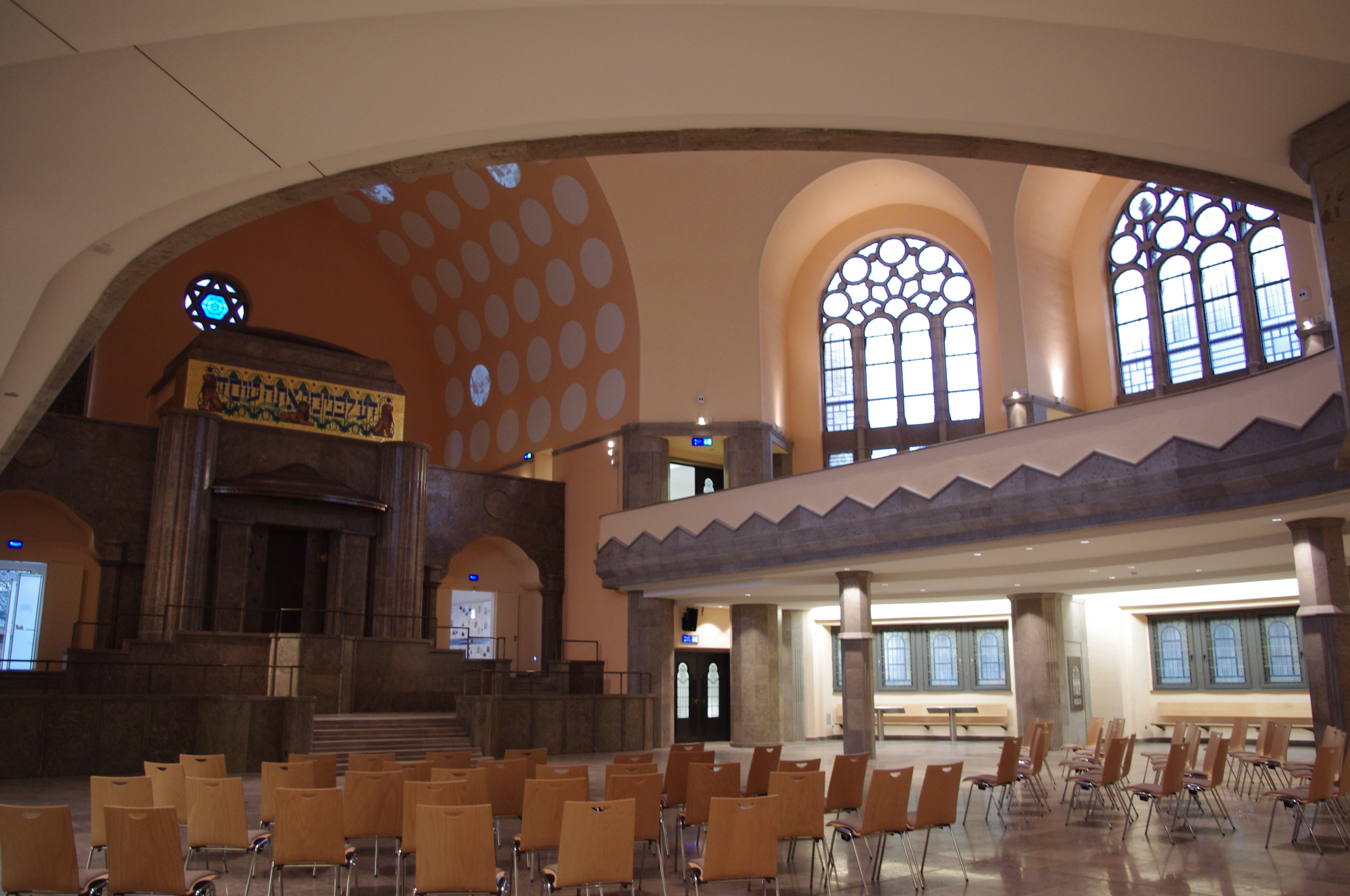 Innenaufnahme aus der Alten Synagoge 2010